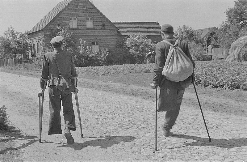 Original image description from the Deutsche FotothekVersehrte des 2. Weltkrieges (Beinamputierte) mit Unterarmstützen auf einer Dorfstraße bei Dresden